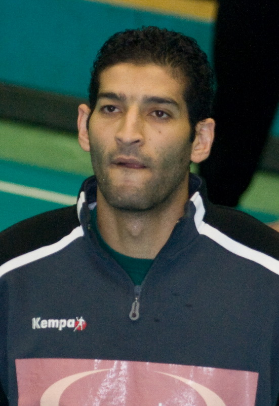 Handballspieler "Hany El Fakharany"; Bundesliga Deutschland - Mannschaft: Füchse Berlin; Spielstätte: Nordfrost-Arena am 20.10.2007 beim Spiel Wilhelmshavener HV vs. Füchse Berlin